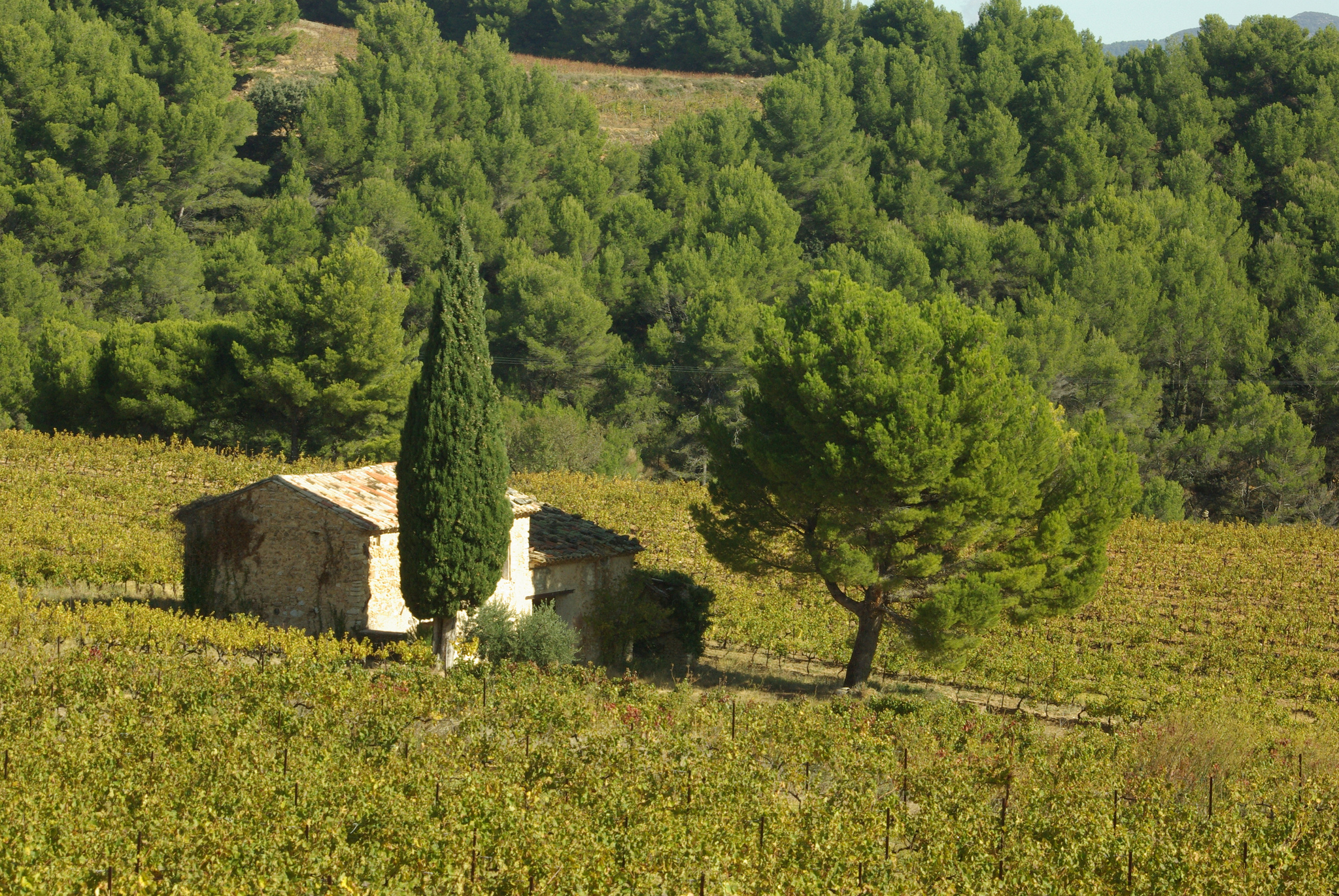 Cabanon et son cyprès au milieu des vignes près de Beaumes-de-Venise